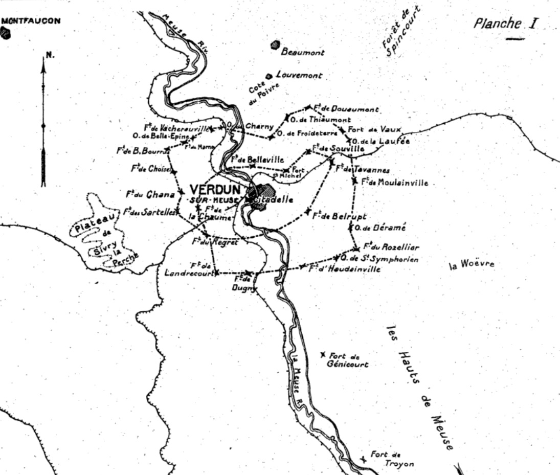 Plan de la région fortifiée de Verdun, publié dans la Revue du génie militaire en 1921.